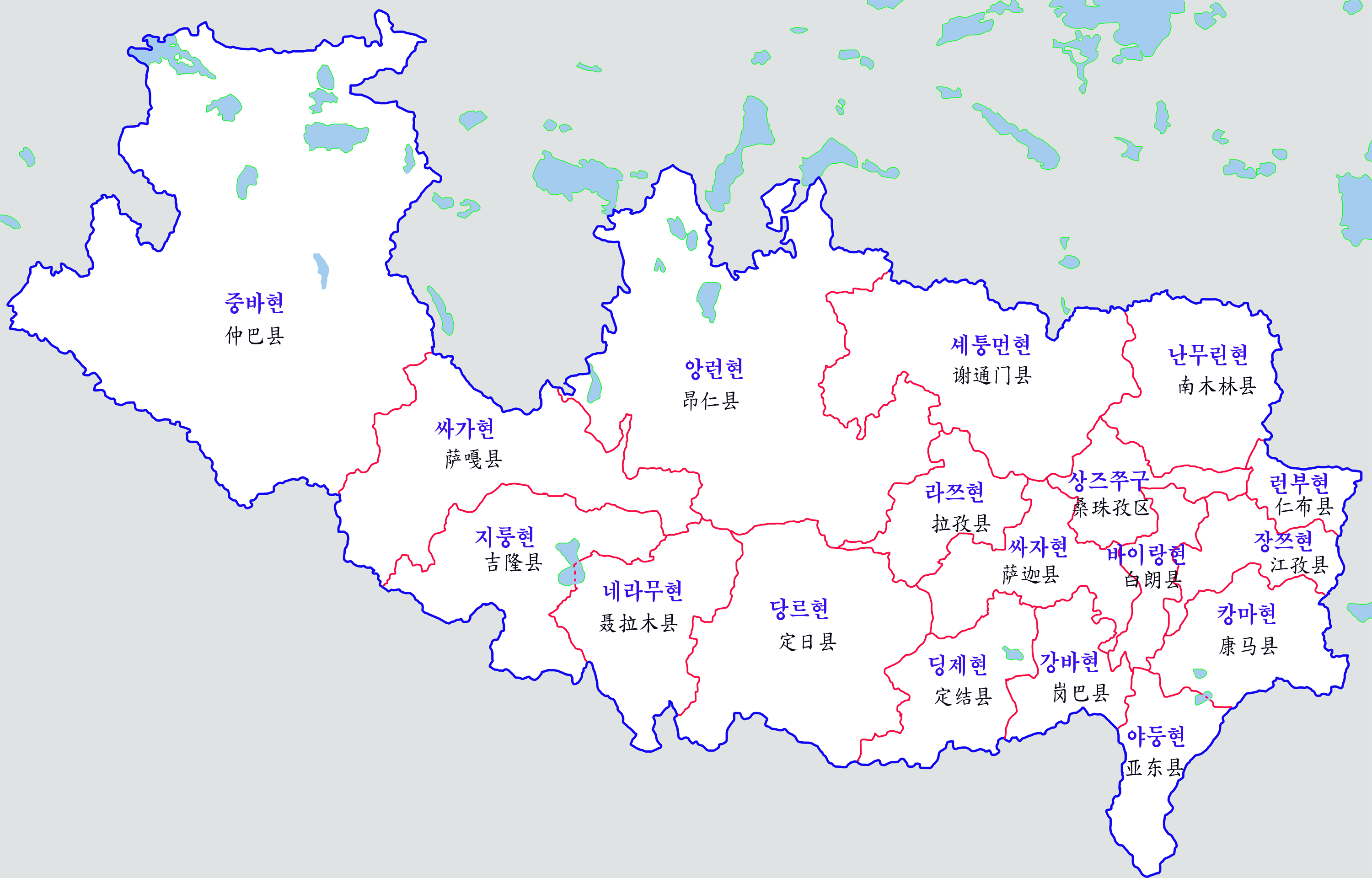 르카쩌시 행정구역